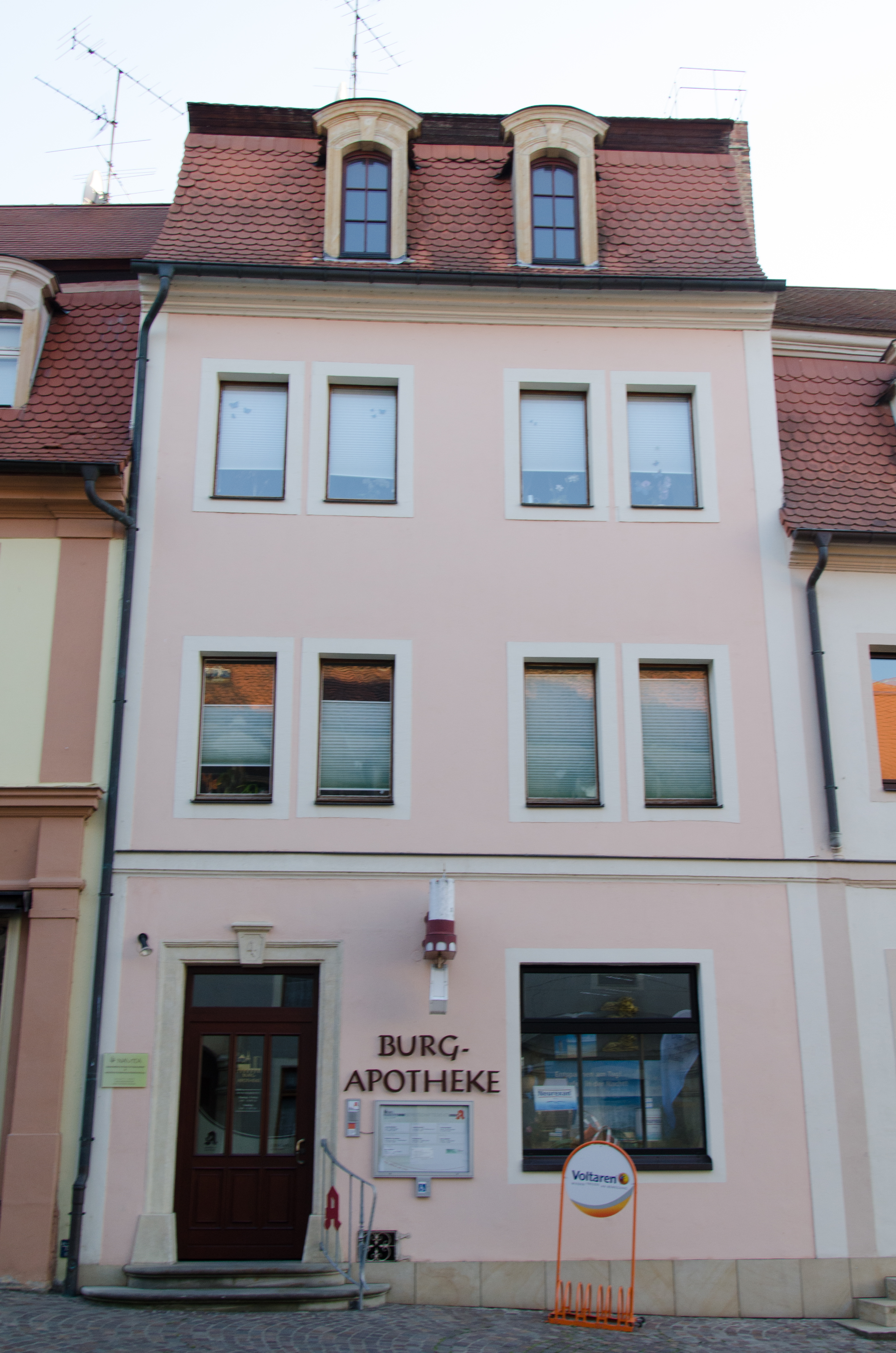 Querfurt, Nebraer Straße 4